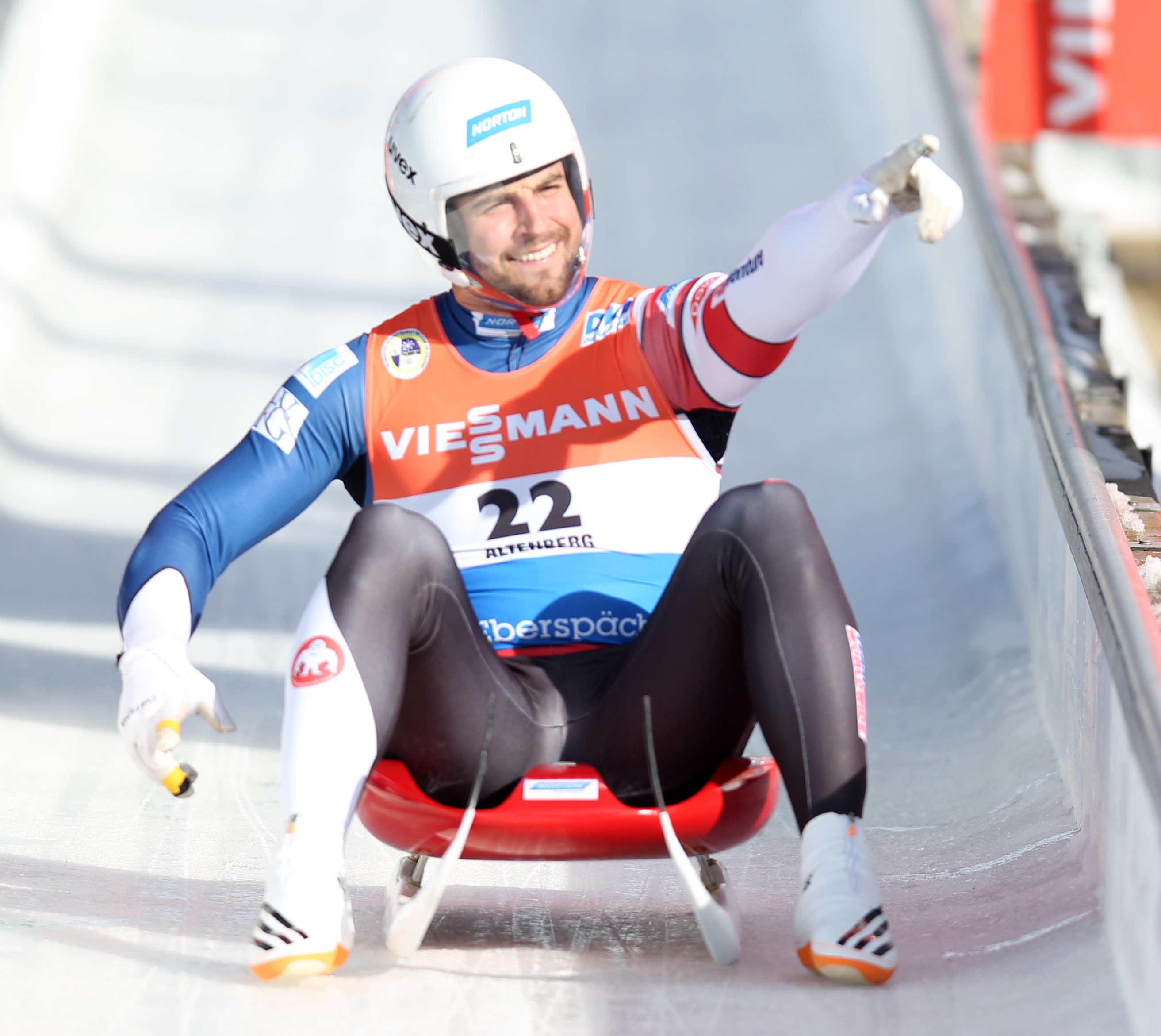 Chris Mazder beim Rennrodel-Weltcup der Herren in Altenberg 2017